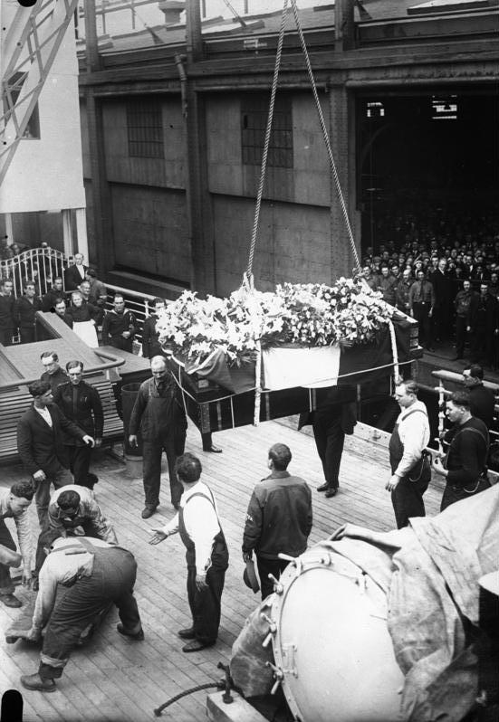 Die Ueberführung der grossen Tragödin Eleonora Duse von Amerika nach Italien. Der Sarg wird an Bord eines italienischen Kreuzers gebracht.